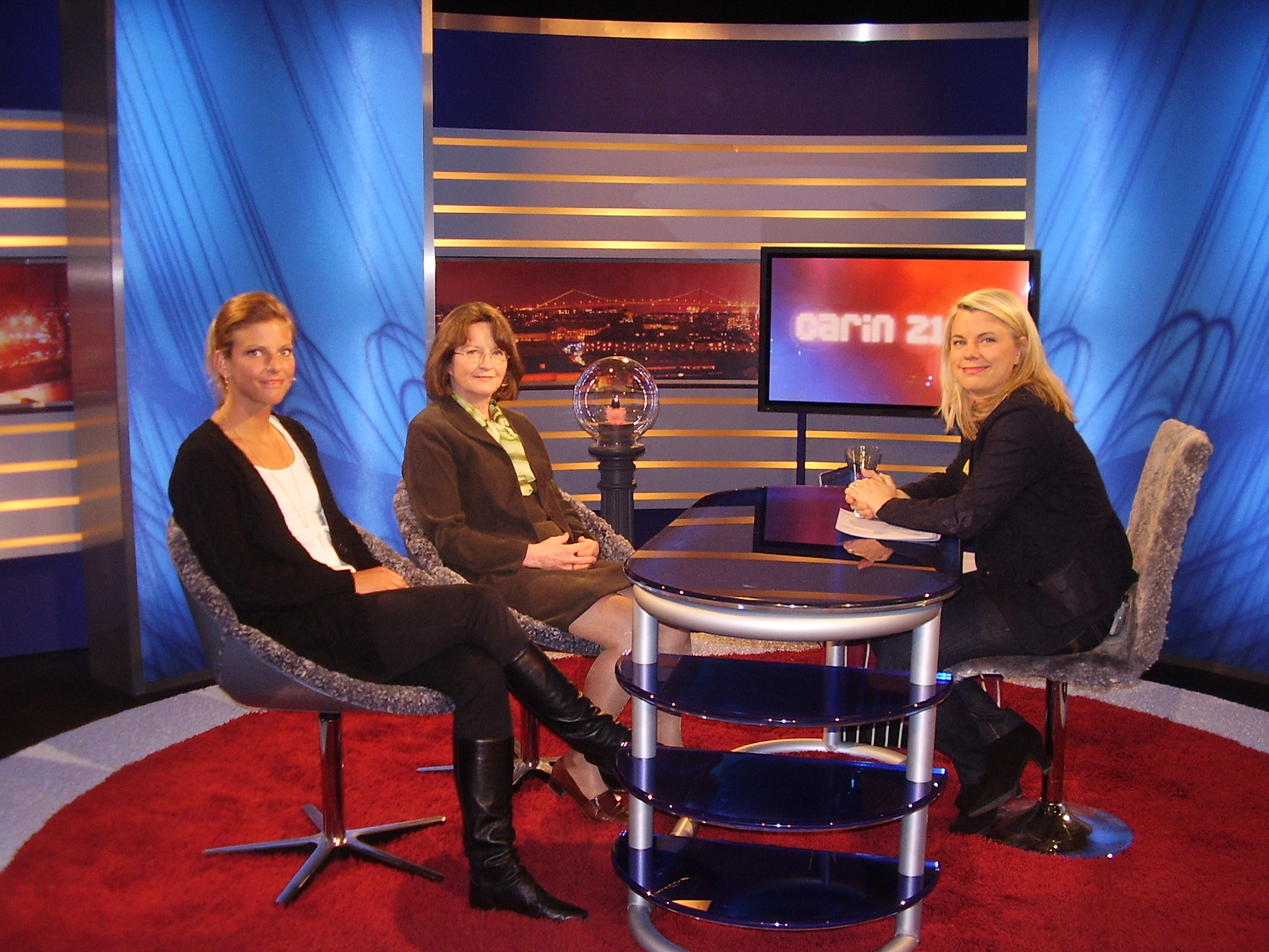 Carin Hjulström i talkshowen Carin 21:30 med gästerna Anna Lindberg, simhoppare och Irma Rosenberg, förste vice riskbankschef.